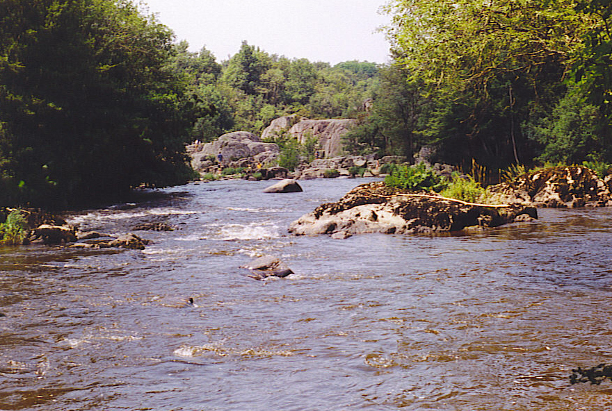 eigen foto - De Gartempe bij de Porte d'Enfer